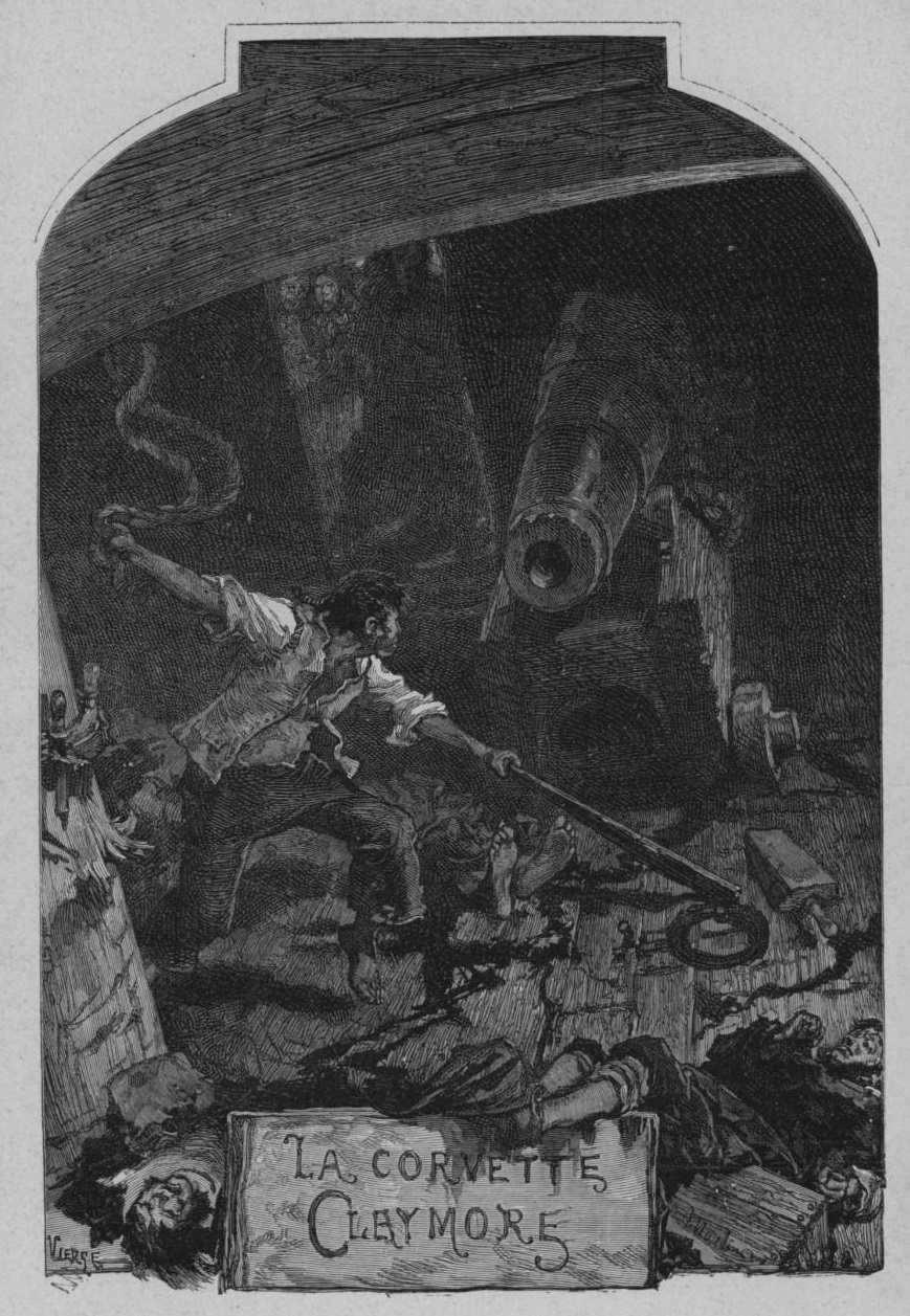 Gravure d’Alfred Martin, d’après un dessin de Daniel Vierge, pour une édition de Quatre-Vingt-Treize, de Victor Hugo, Paris, impr. J. Claye, A. Quantin et Cie, s.d.